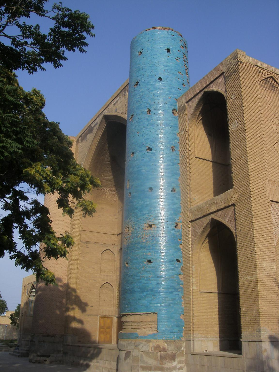 Sheikh-shahab tomb, Ahar, Iran